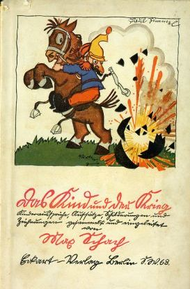 Das Kind und der Krieg. Kinderaussprüche, Aufsätze, Schilderungen und Zeichnungen gesammelt und eingeleitet von Max Schach, 118 Seiten. Umschlagillustration von Paul Simmel. Eckart-Verlag, Berlin, 1916 The Child and the War. Children's statements, essays, descriptions and drawings collected and initiated by Max Schach, 118 pages. Envelope illustration by Paul Simmel. Eckart-Verlag, Berlin, 1916